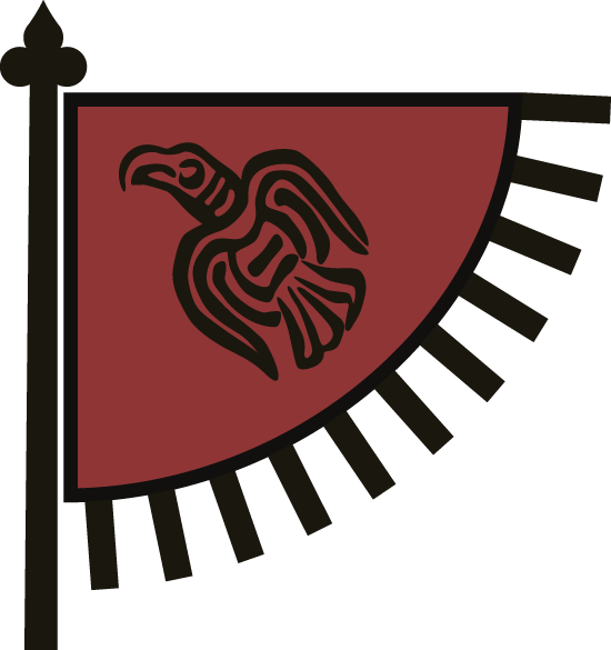 Ravnefanen, brugt af flere vikingehøvdinge på deres krigs- og handelsflåder, i årene 800-1000.